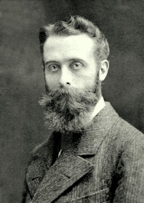 Scan eines Porträtfotos von Robert Suermondt, Bankier in Aachen